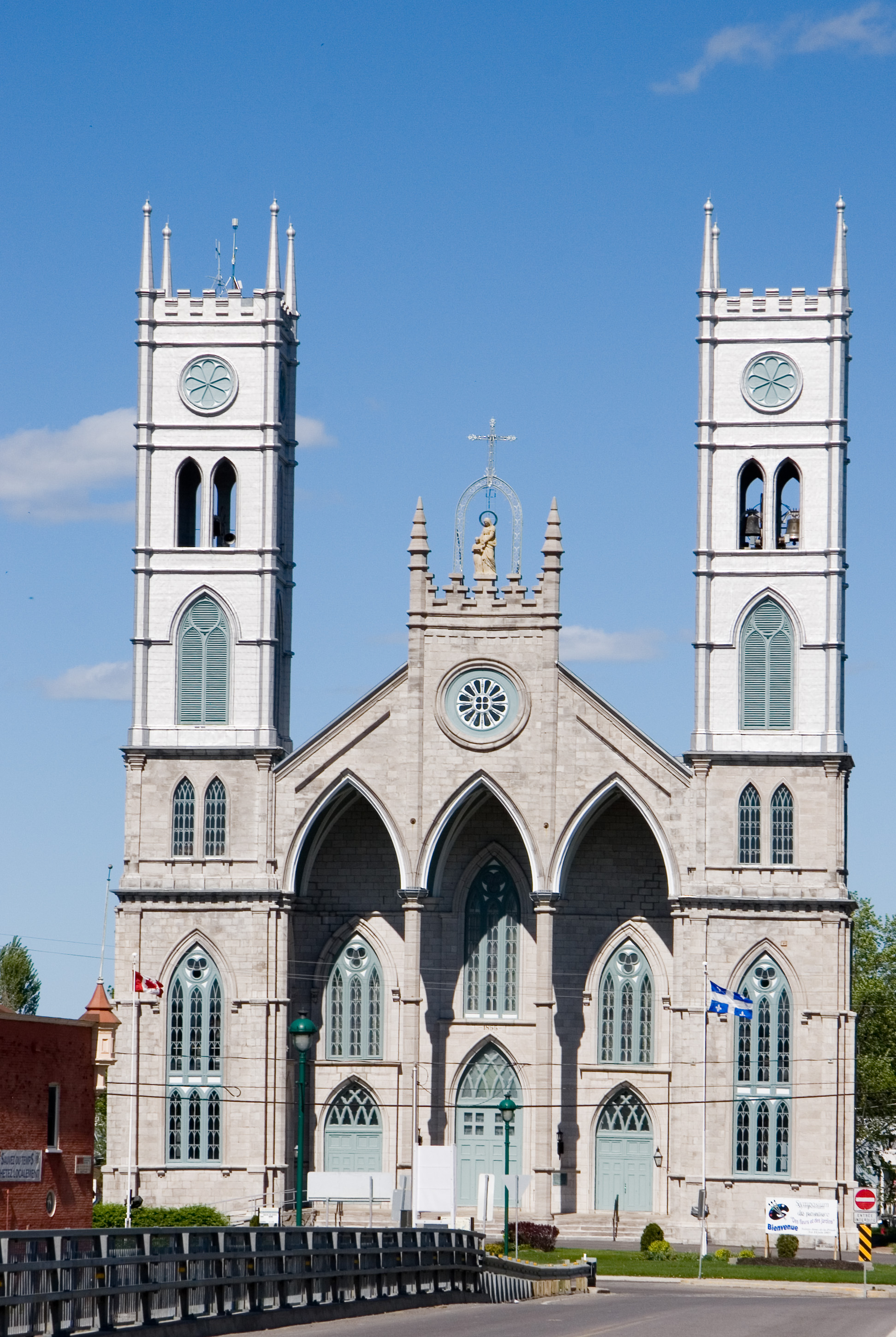 Église Sainte-Anne-de-la-Pérade, Québec